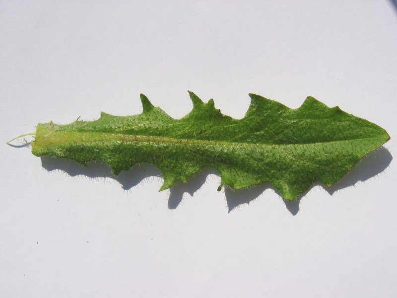 Gewöhnliches Ferkelkraut Hypochaeris radicata, Stoltera Nähe Rostock